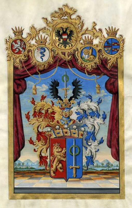 Wappen aus dem Freiherrenstandsdiplom von Franz II./I. (römisch-deutscher Kaiser 1792-1806, Kaiser von Österreich 1804-1835) für den Artillerie-Offizier Vincenz von Augustin (1780-1859). Ausgestellt Wien 1822, mit eigenhändiger Unterschrift des Kaisers. Augustin führte nicht nur die Raketenwaffen in der österreichischen Armee ein, nach 1848 entwarf er auch das "Arsenal" in Wien, wobei ihm in weiterer Folge auch die Bauleitung übertragen wurde.